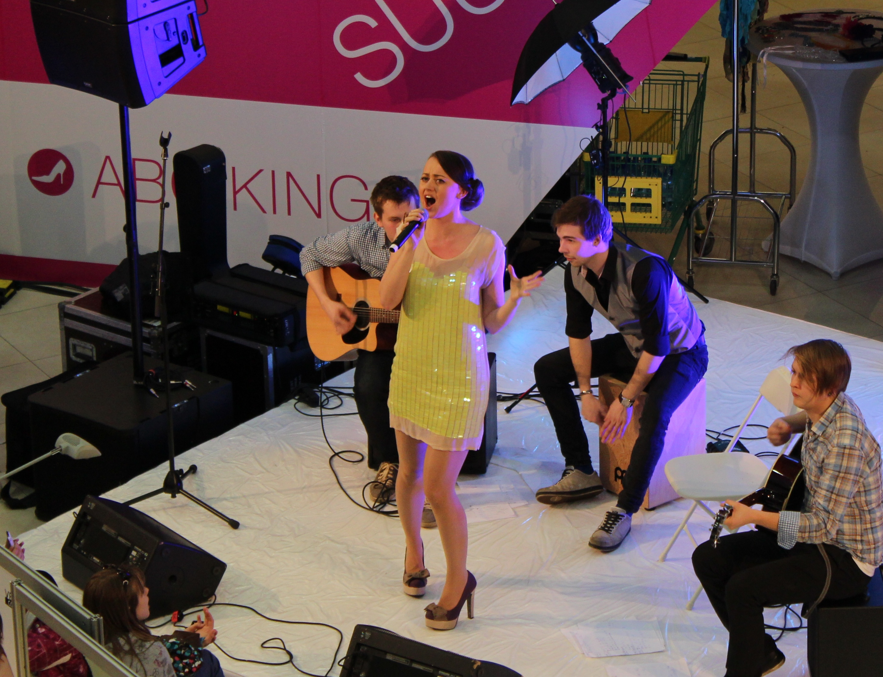 Teele Viira esinemas akustilise kavaga Kristiine keskuse aatriumis 12. aprillil 2012.